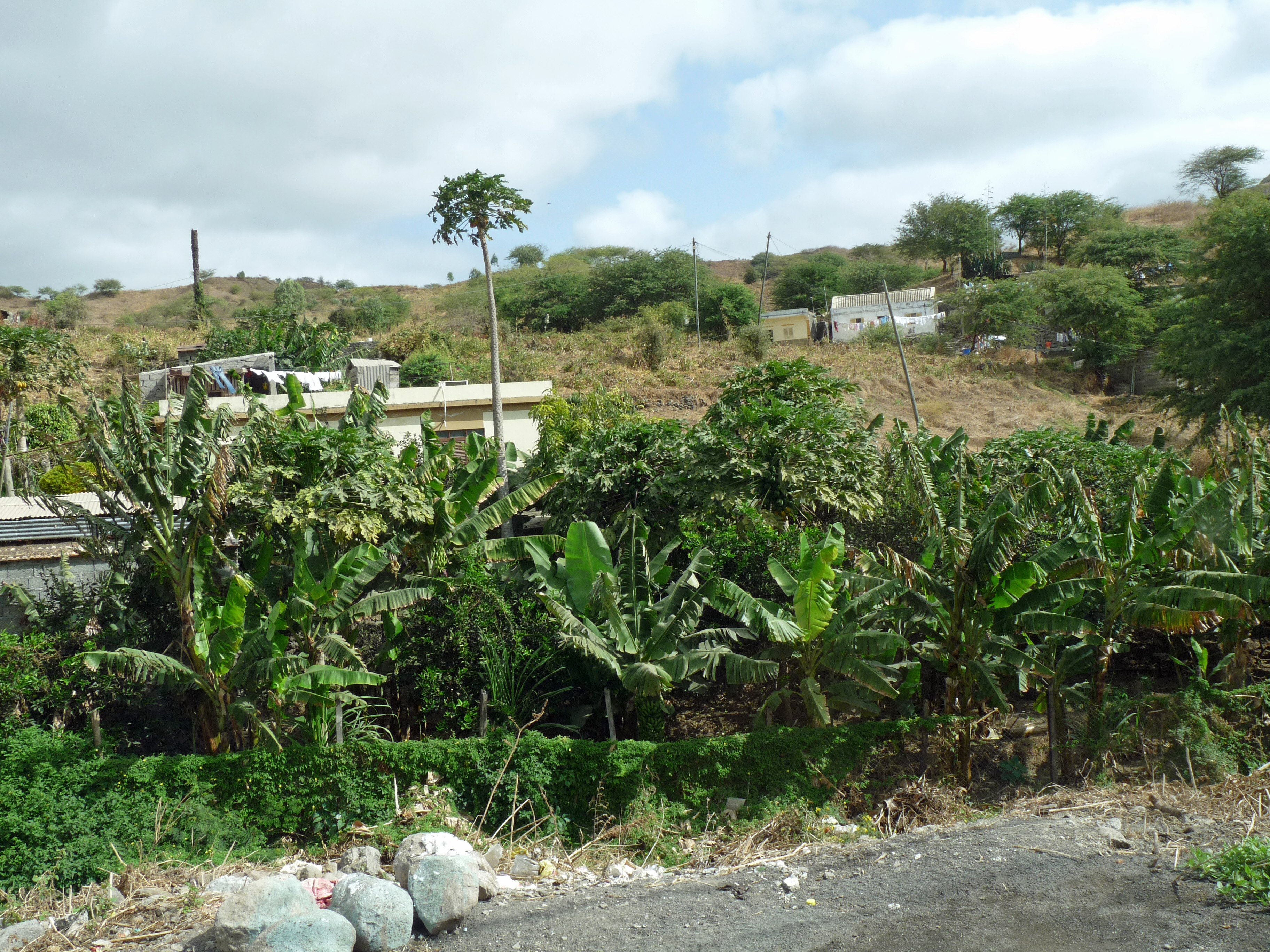 São Domingos (île de Santiago, Cap-Vert)